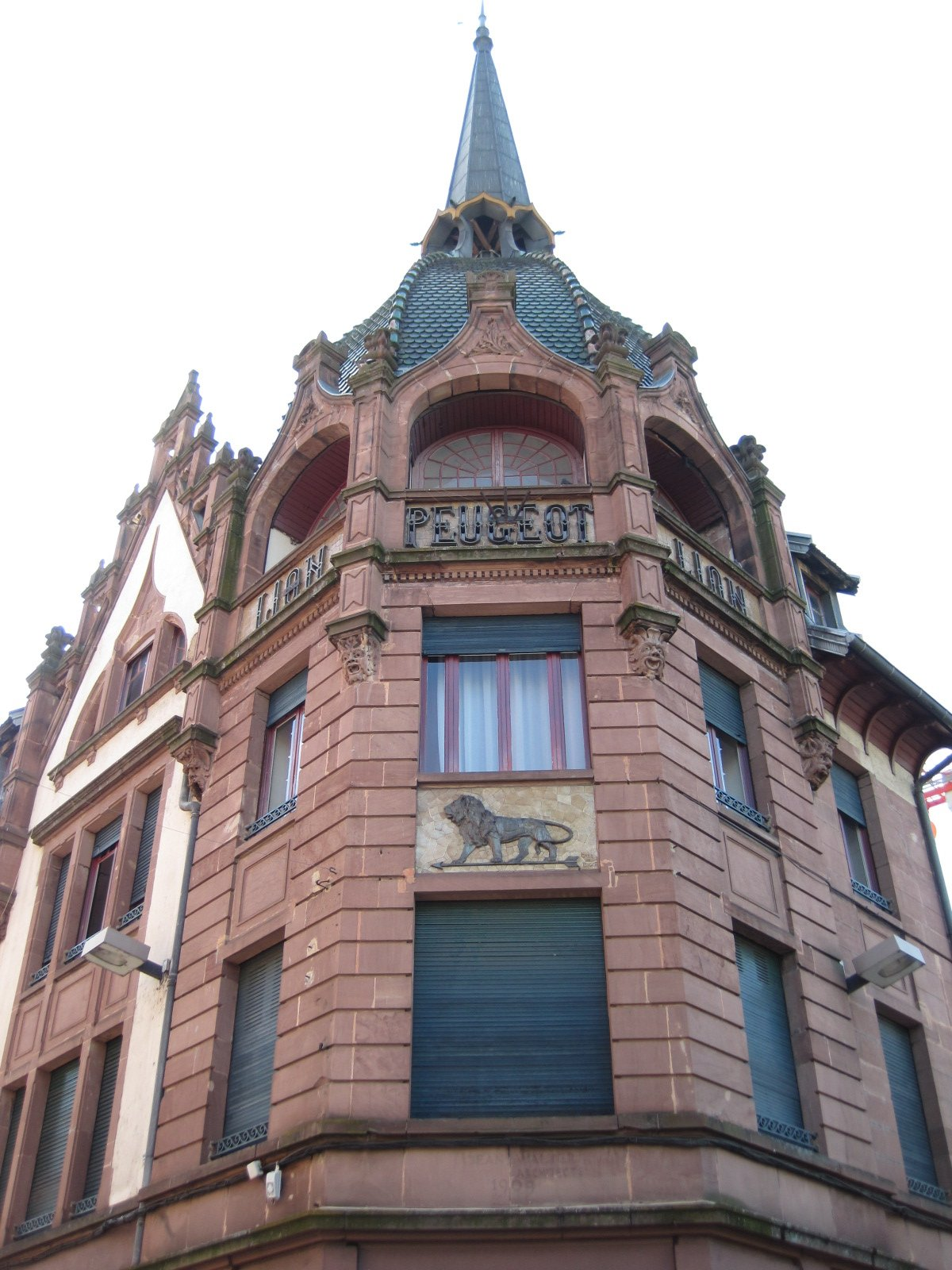 Lion de Peugeot